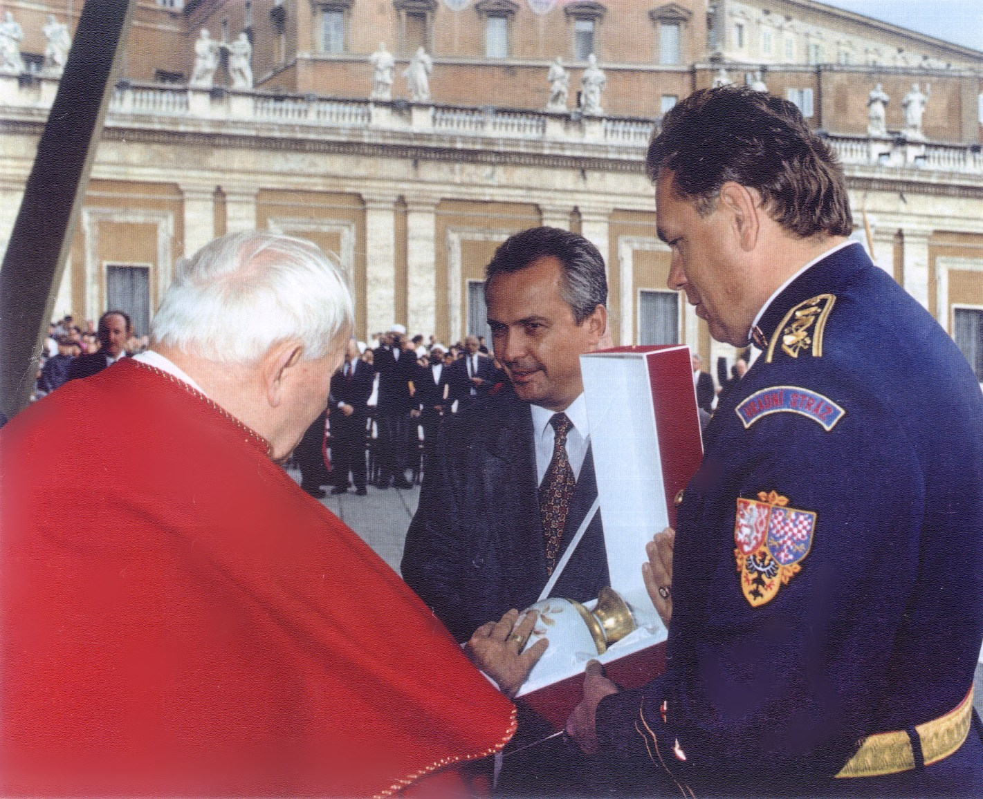 Вручение вазы Папе Римскому, Иоанну Павлу второму